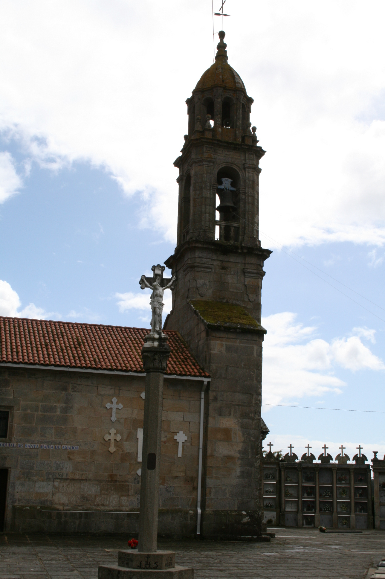 A igrexa de Santa María de Asados, Rianxo.